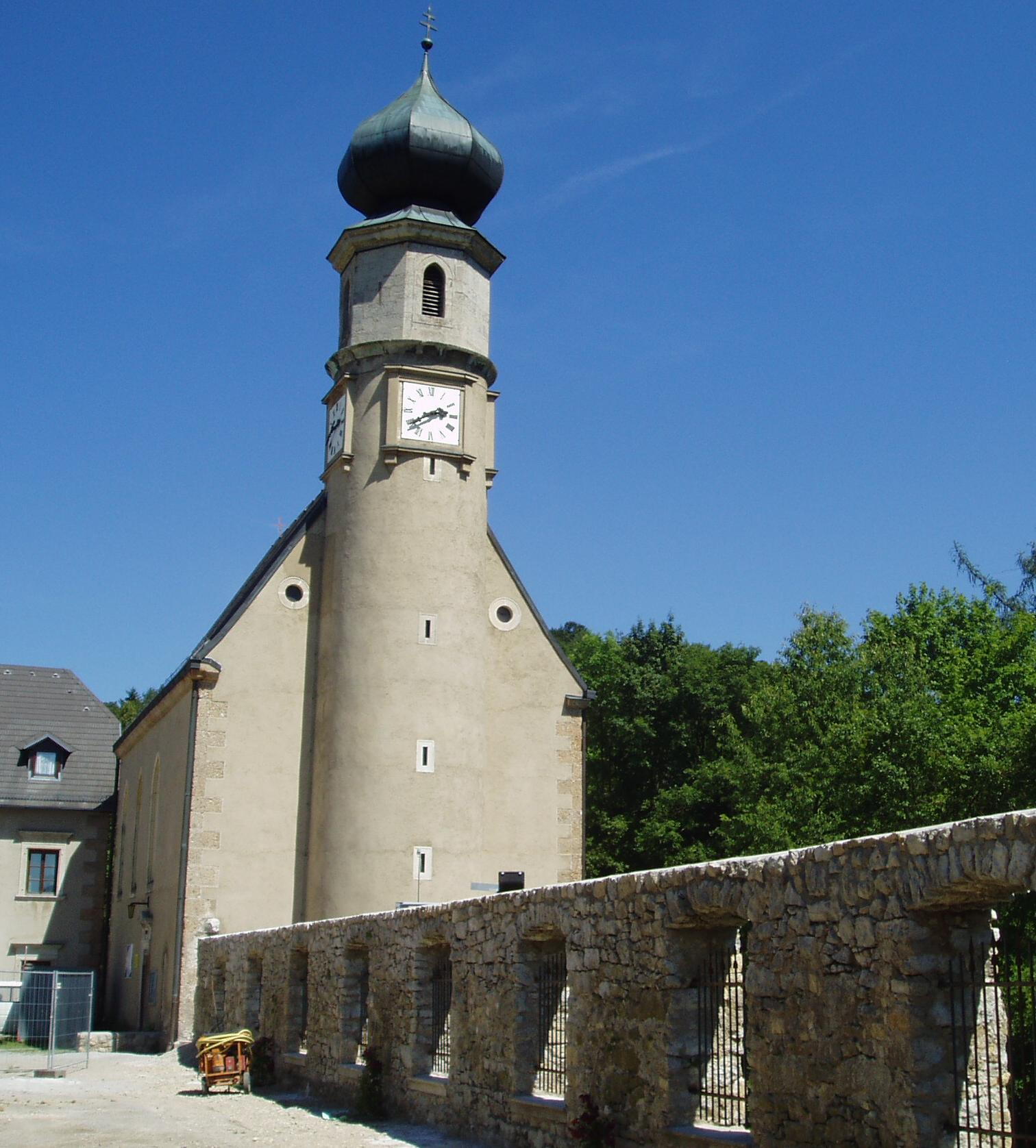 Foto der Burg und Kirche in Neuhaus vom 21.Juni 2005 von mir selbst. Kategorie:Bild:Kirche